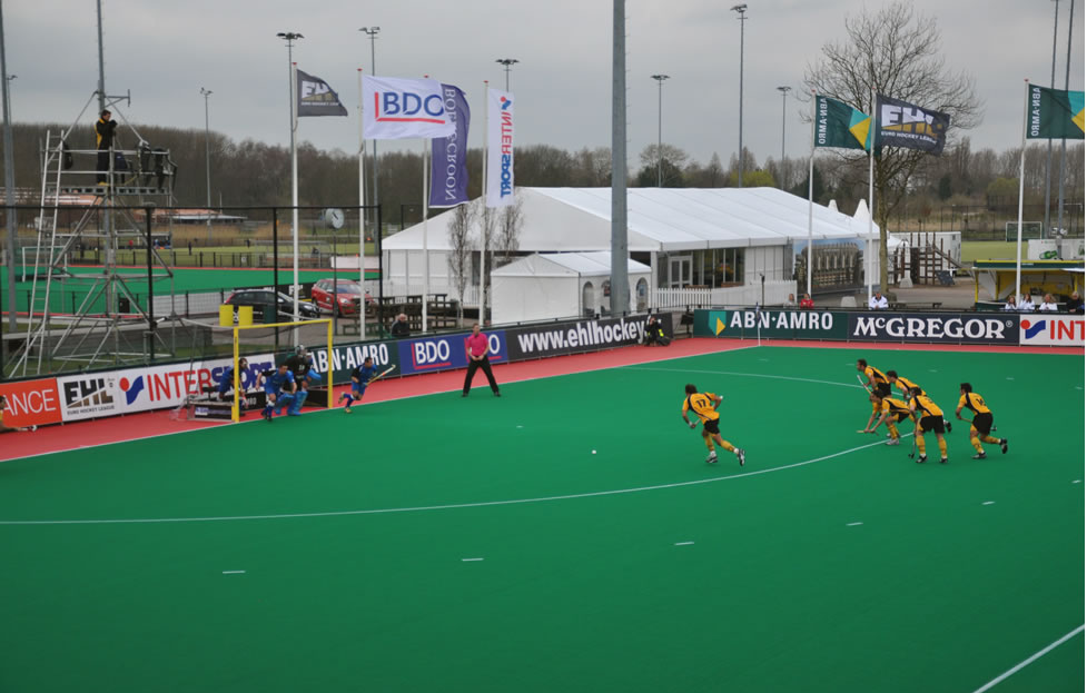 Atlètic Terrassa - Grunwald Poznan 4-3 (Euroleague)